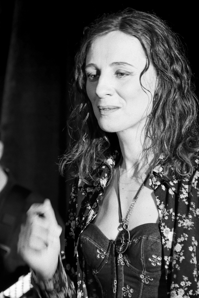 Ольга Арефьева, Февраль 2007